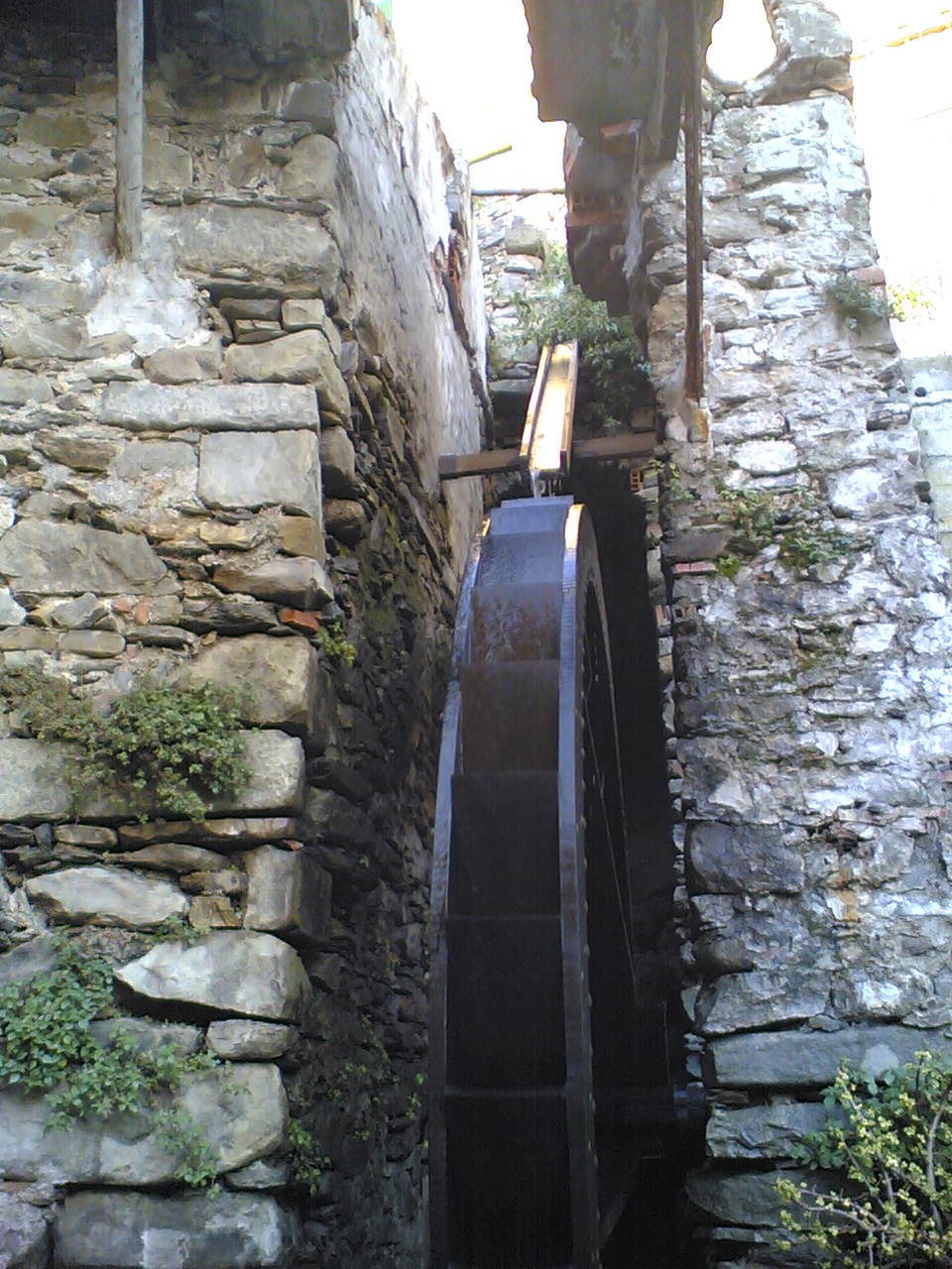 Ruota idraulica per un frantoio nelle Cinque Terre - Italia.